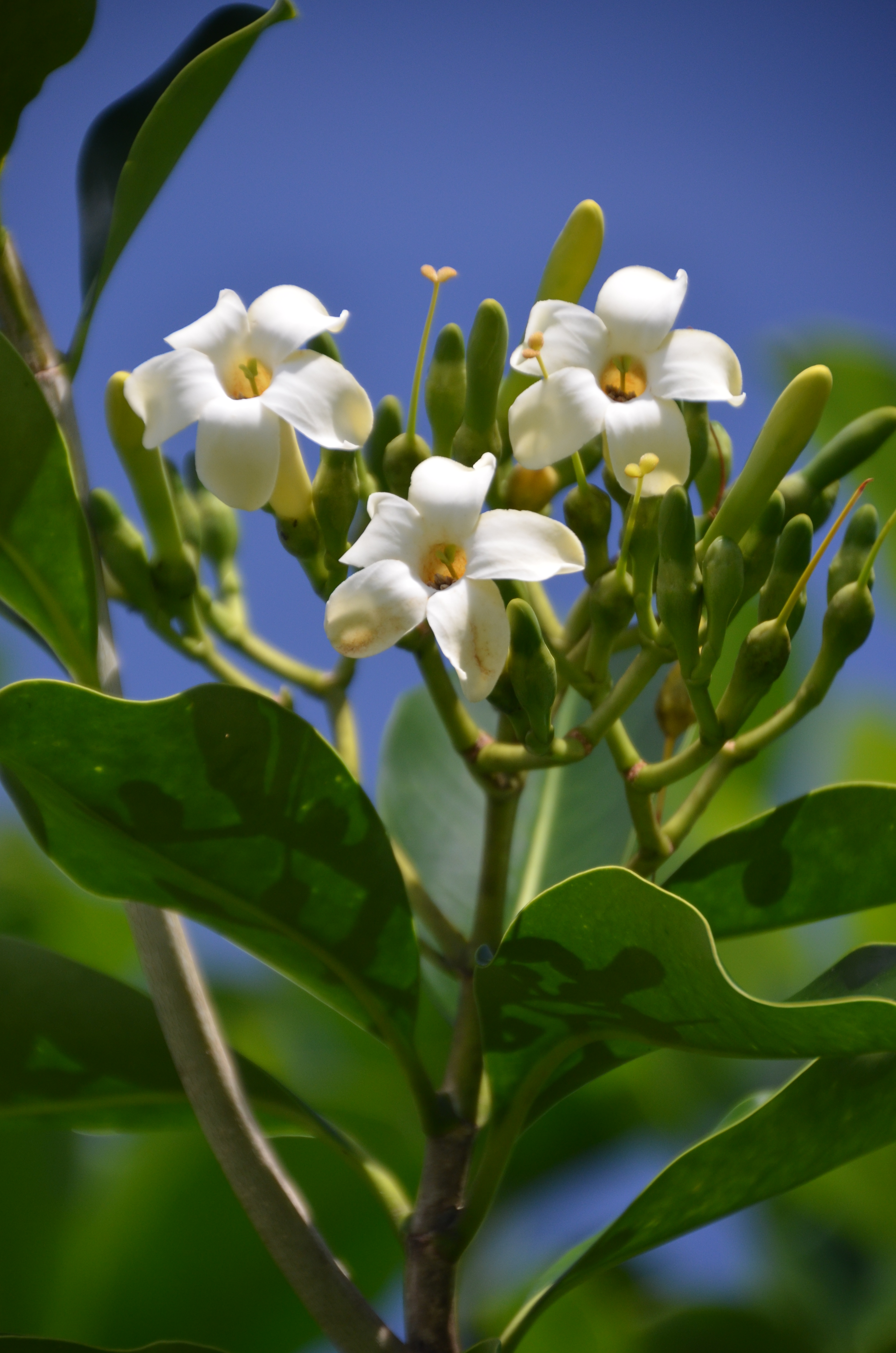 Pua kenikeni (Fagraea berteriana; a0002983)